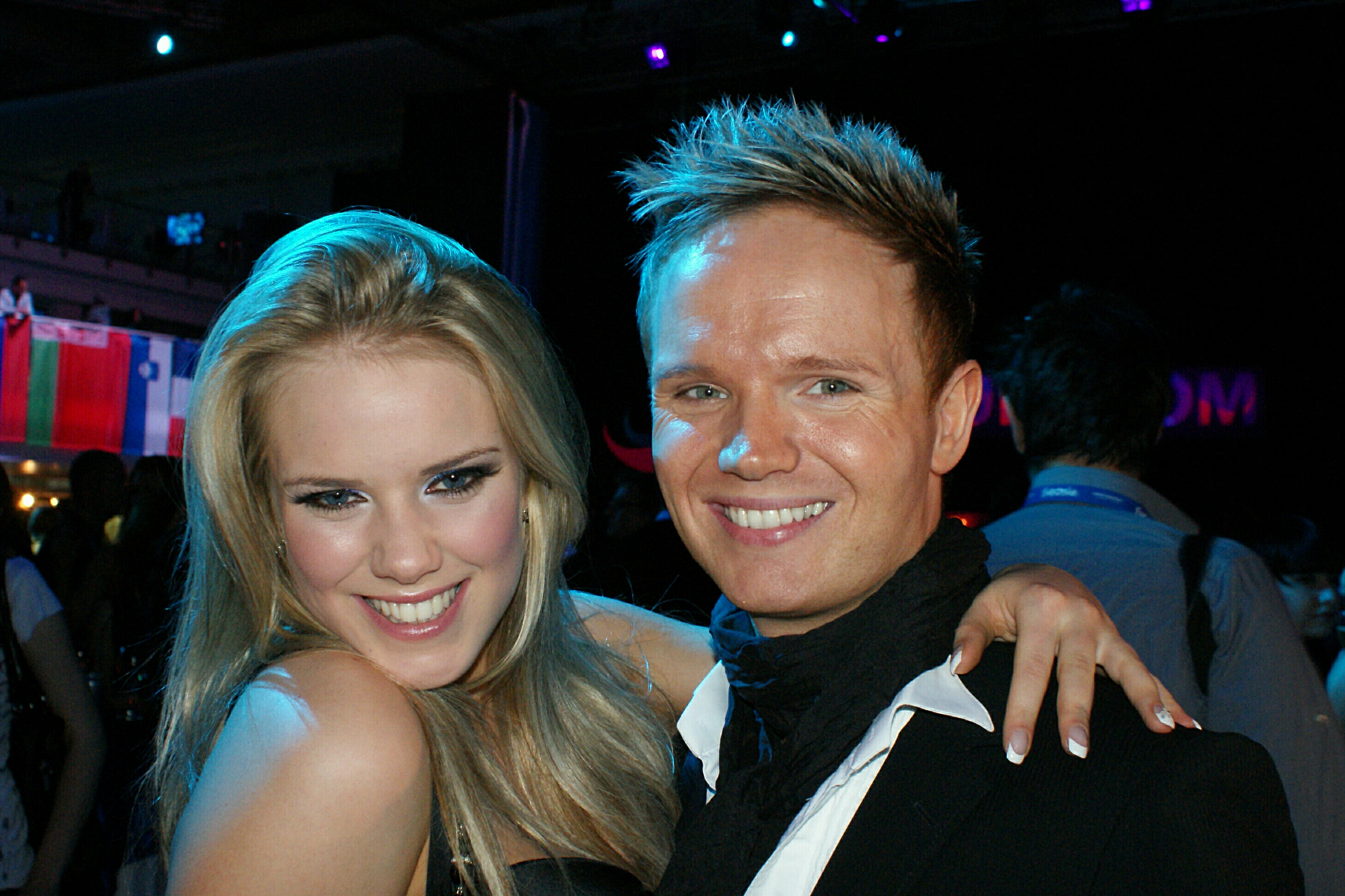 Jóhanna Guðrún Jónsdóttir & Friðrik Ómar in Moscow, 2009